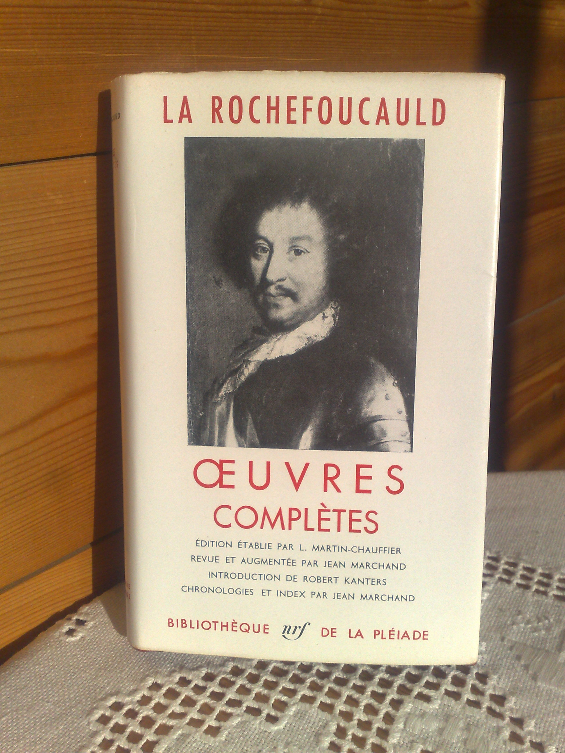 Édition Pléiade des oeuvres complètes de La Rochefoucauld